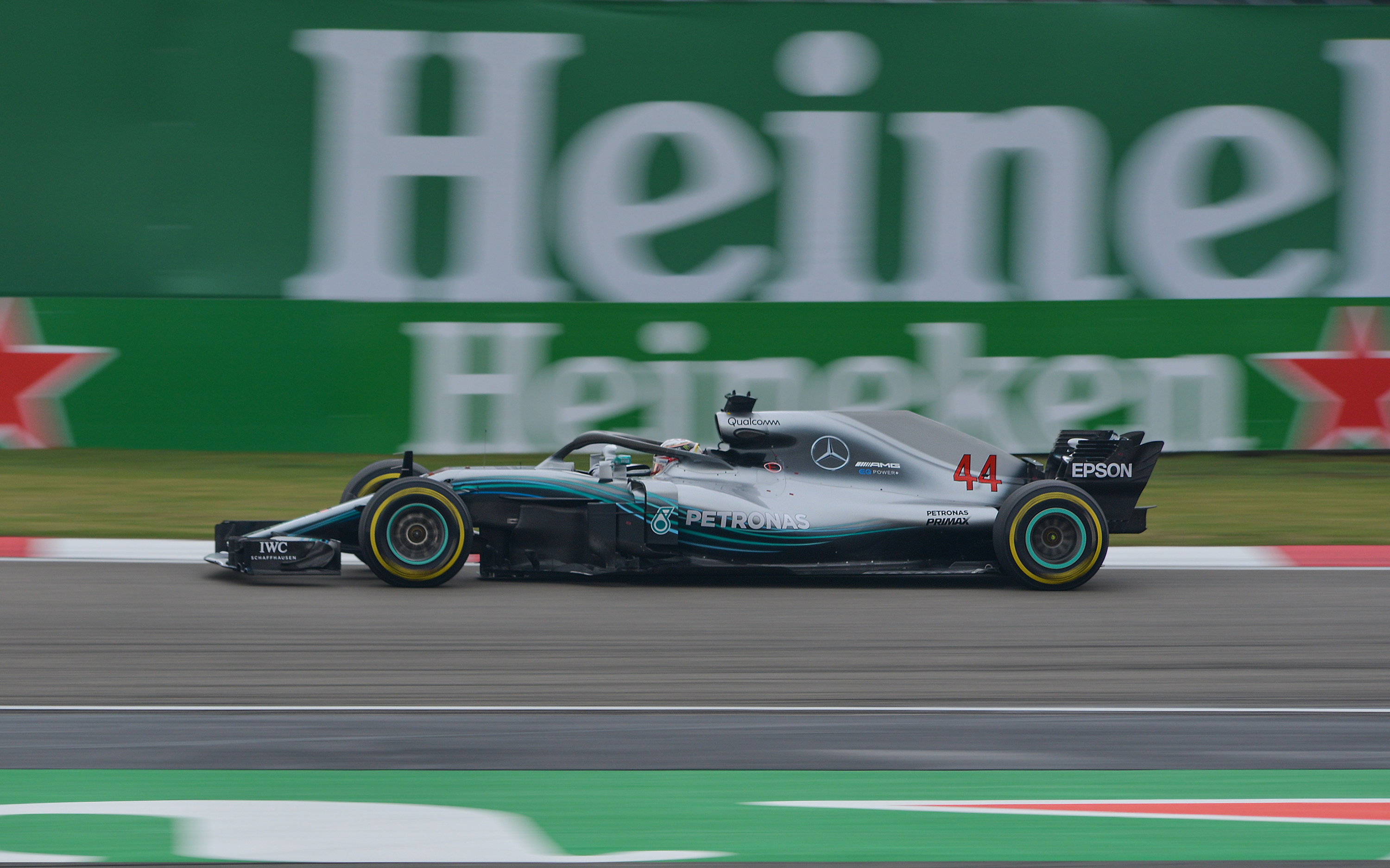 Mercedes